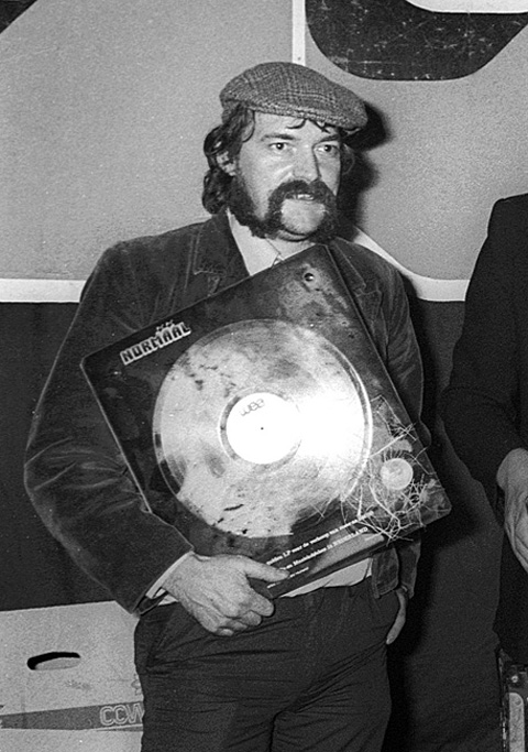 Drummer en mede-oprichter Jan Manschot van Normaal